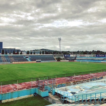 Estadio Tróccoli en febrero de 2019